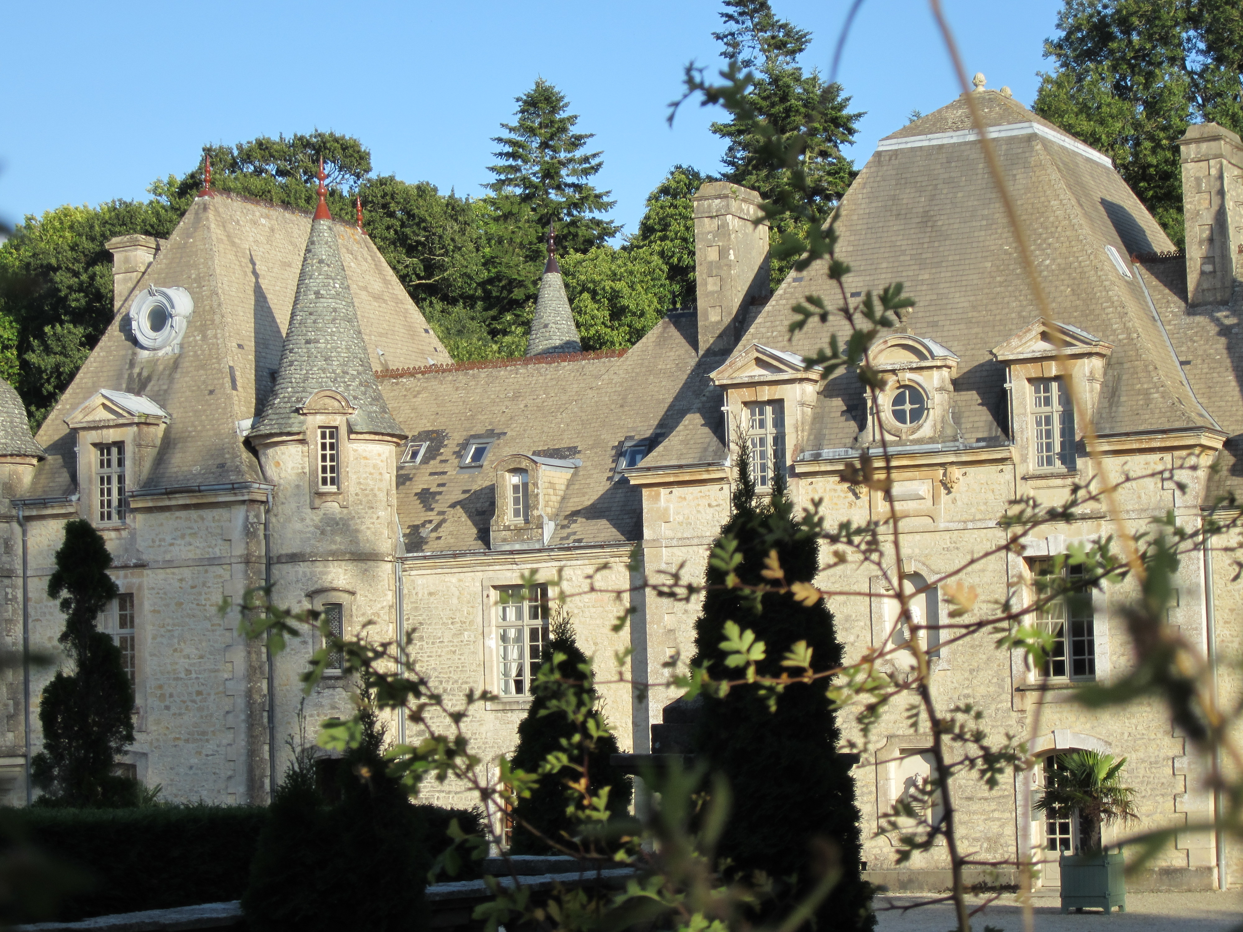 Château de Servigny, Yvetot-Bocage .